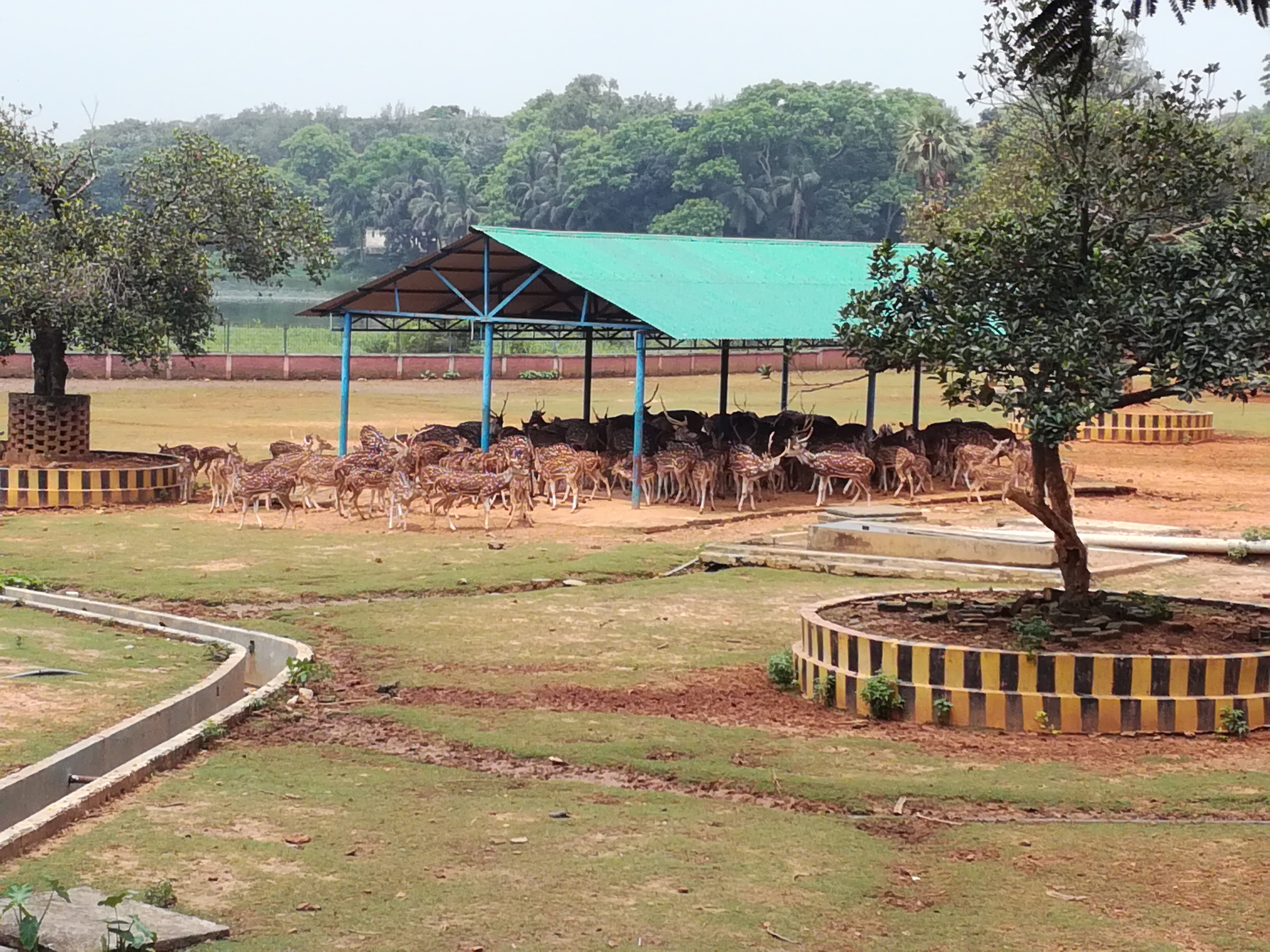 পড়ন্ত বিকালে বাংলাদেশের জাতীয় চিড়িয়াখানার অভ্যন্তরে চিত্রা হরিণের দল।